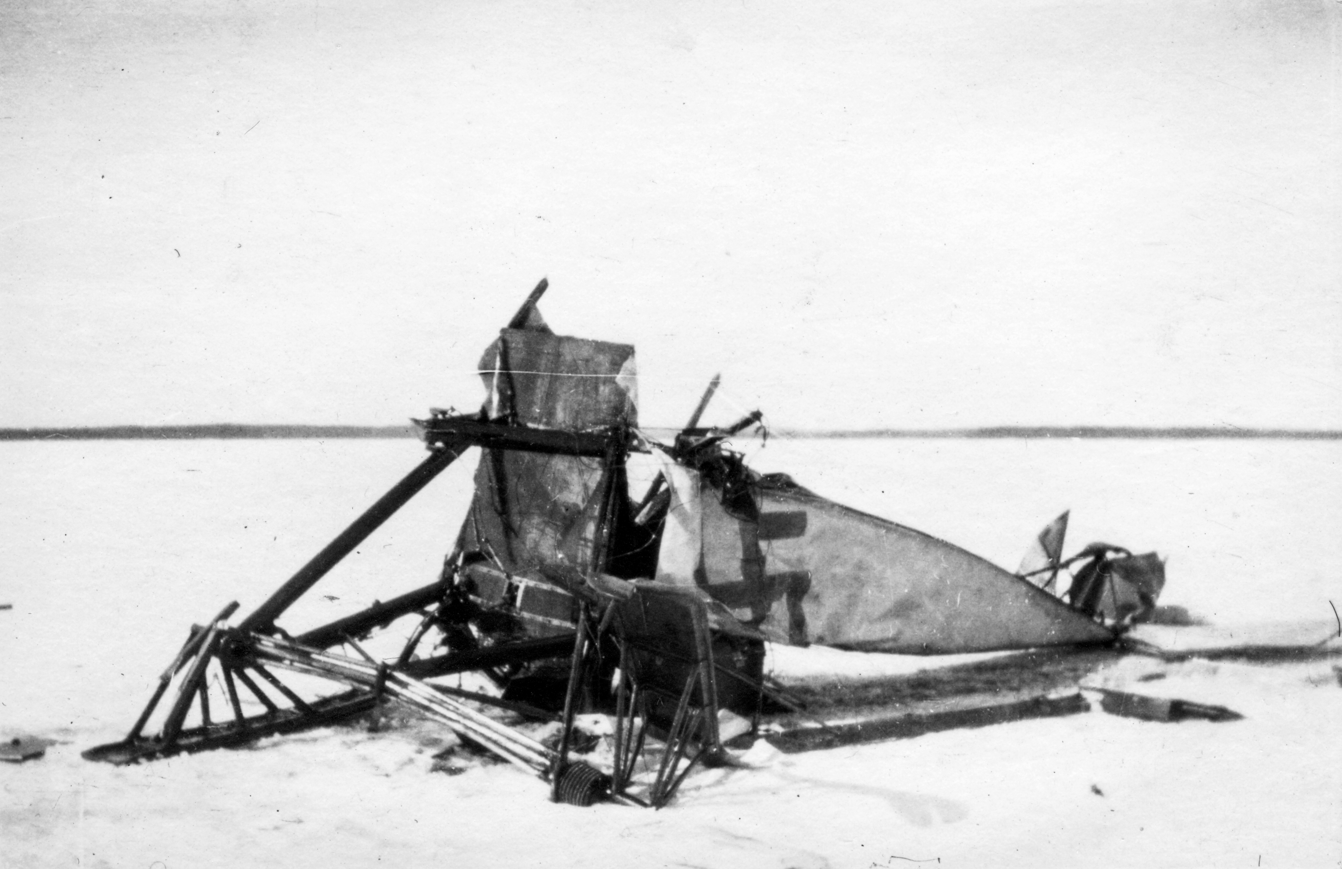 Valkoisten Thulin typ D -lentokone tuhoutuneena Näsijärven jäällä.Ruotsalainen kreivi Eric von Rosen lahjoitti Suomen valkoiselle hallitukselle Thulin typ D -hävittäjän, joka tuhoutui onnettomuudessa Tampereella 16. huhtikuuta 1918.